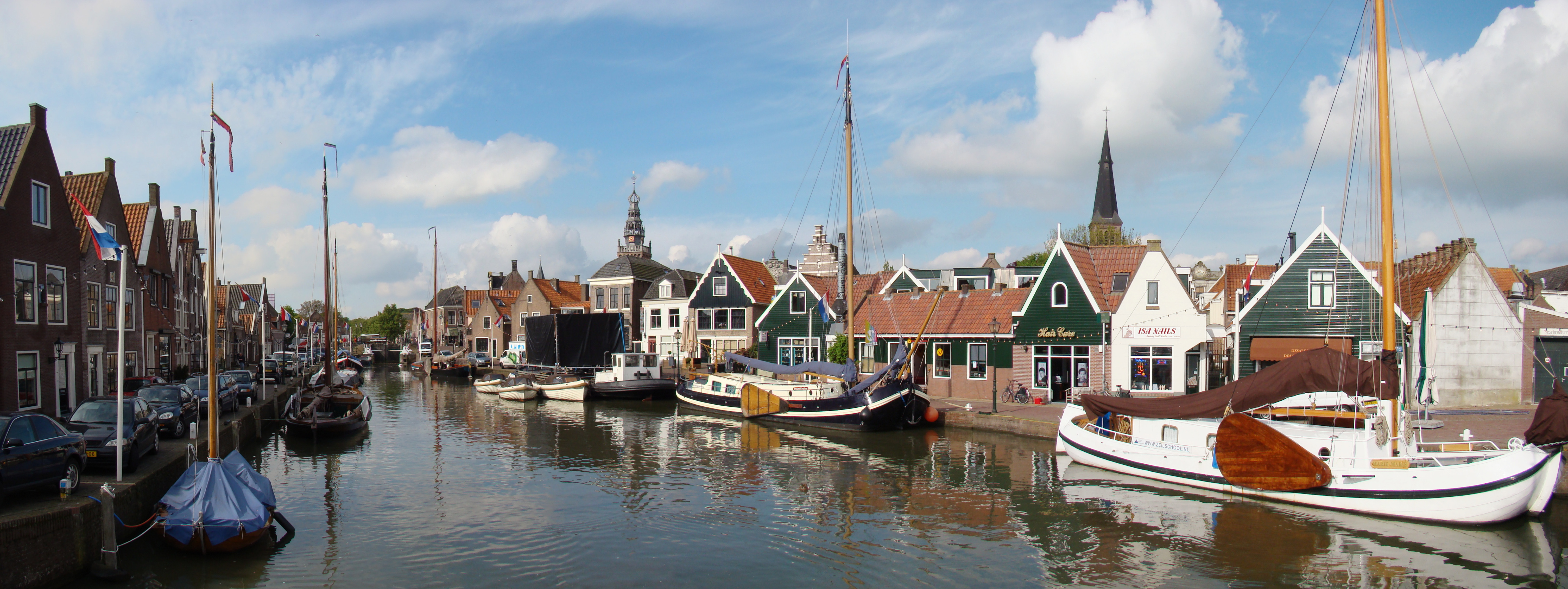 Monnickendam, Haven